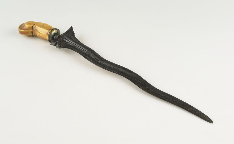 Kris. Staatsiekris (a) in houten schede (b) Rechts op het lemmet een makara-ornament (d.i. een olifantvis ornament: geëolueerd tot monster olifant). Staatsiekris met bewerkt ijzeren lemmet en ivoren handgreep